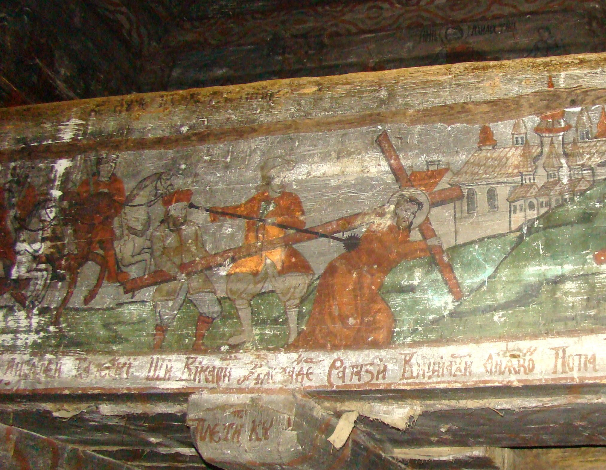 Biserica de lemn "Cuvioasa Paraschiva" , sat POIENILE IZEI